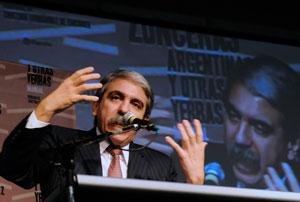 Aníbal Fernández en la presentación de su libro en la Feria del Libro 2011.